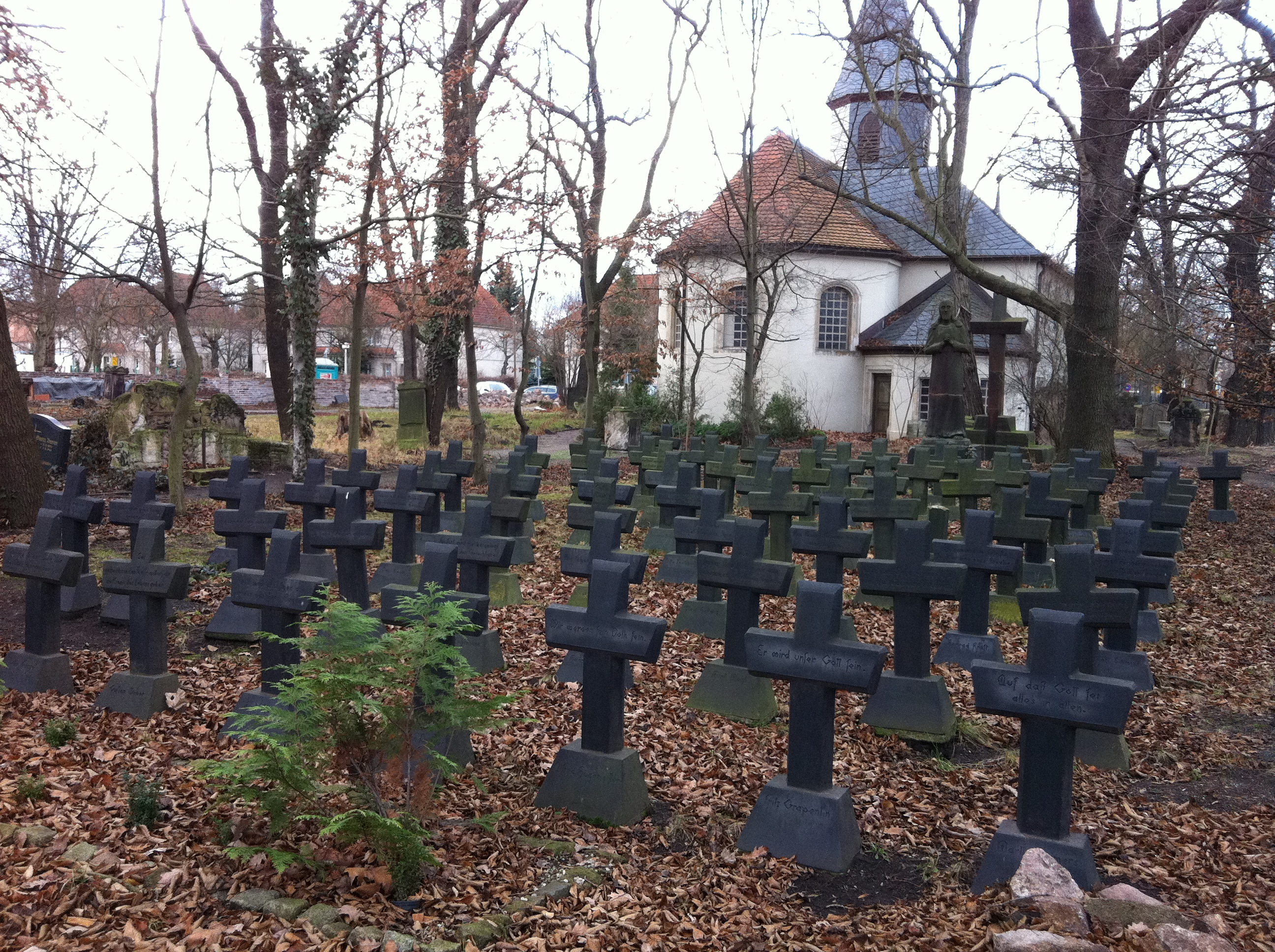 Soldatenfriedhof der Kirche Johannes der Täufer in Halle, Stadtteil Diemitz